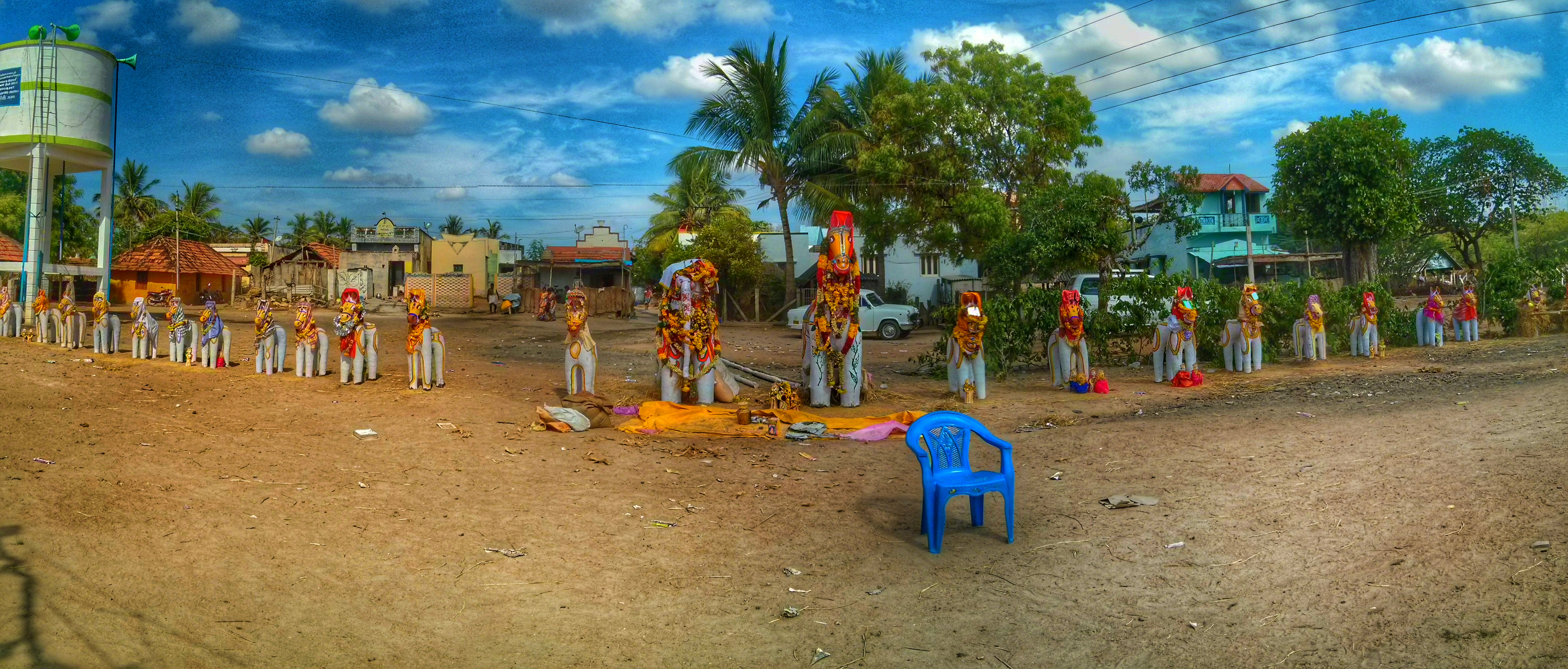 சிவகங்கை மாவட்டம் மாம்பட்டி கிராம புரவி எடுப்பு திருவிழா